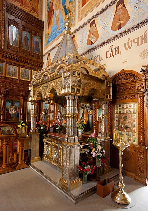 Рака и сень с мощами Севастиана Карагандинского. Автор Звёздкин В.А.